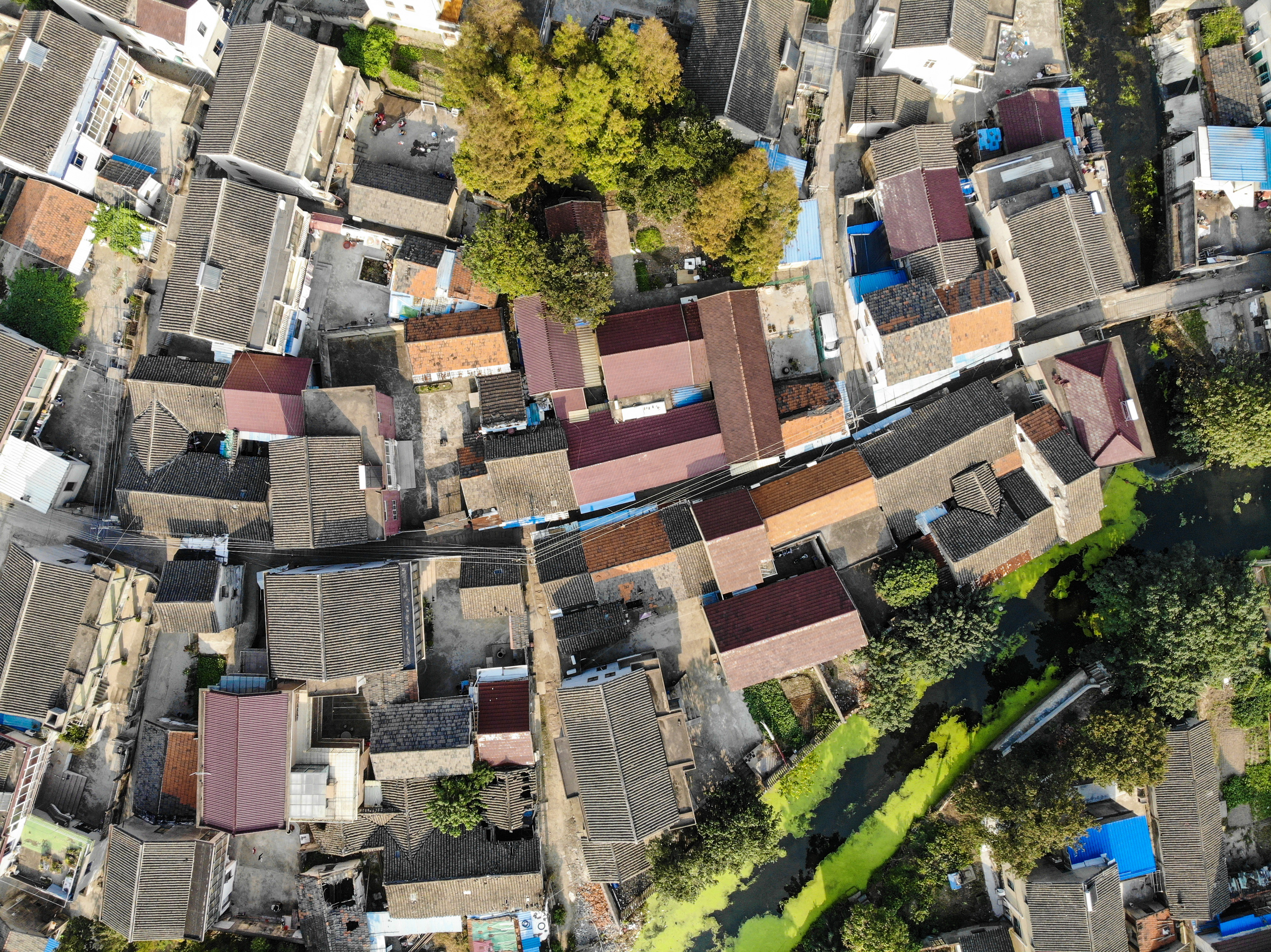 中文（中国大陆）: 旧青浦集镇残留段